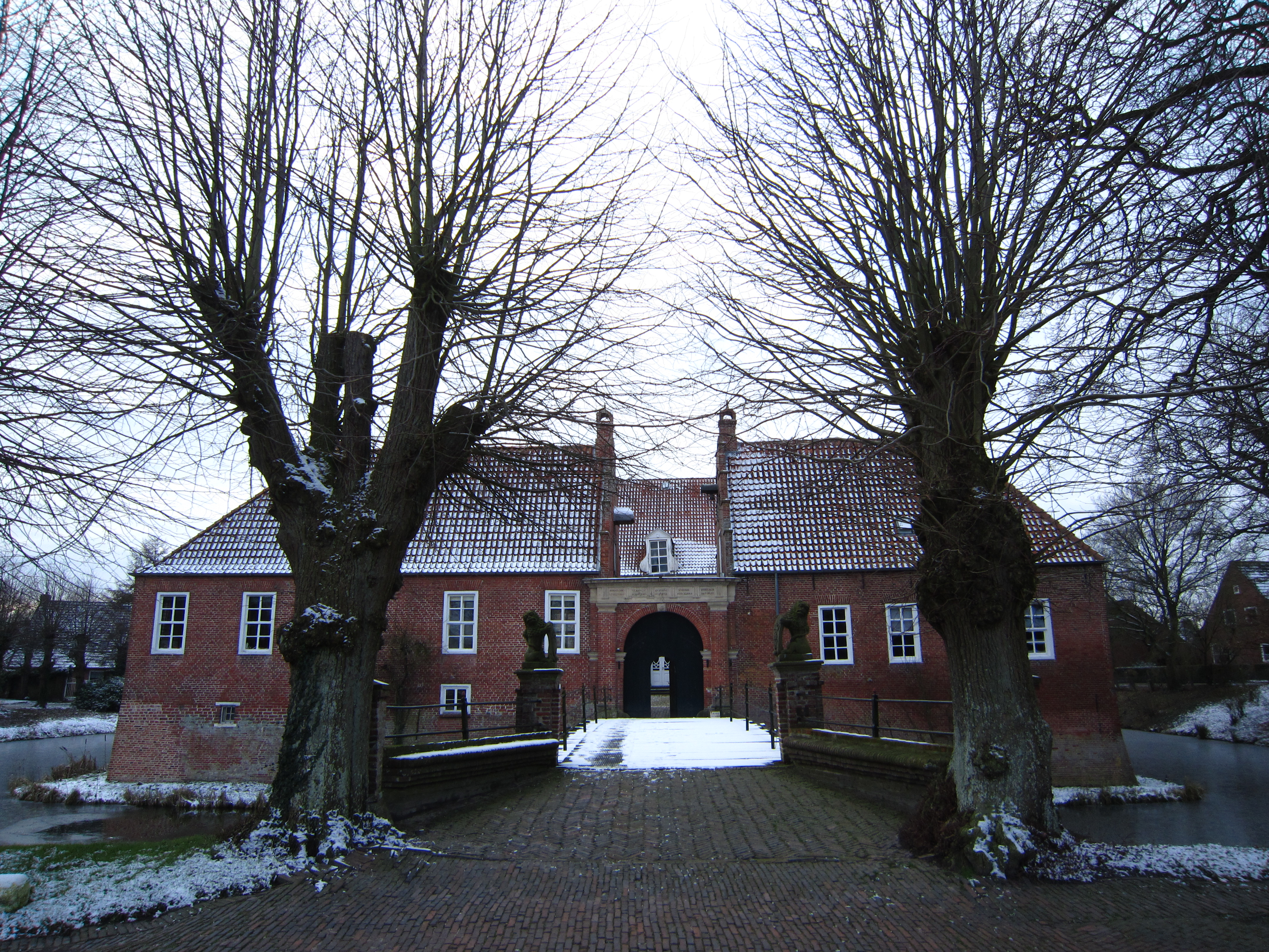 Burg Hinta (Hinte)